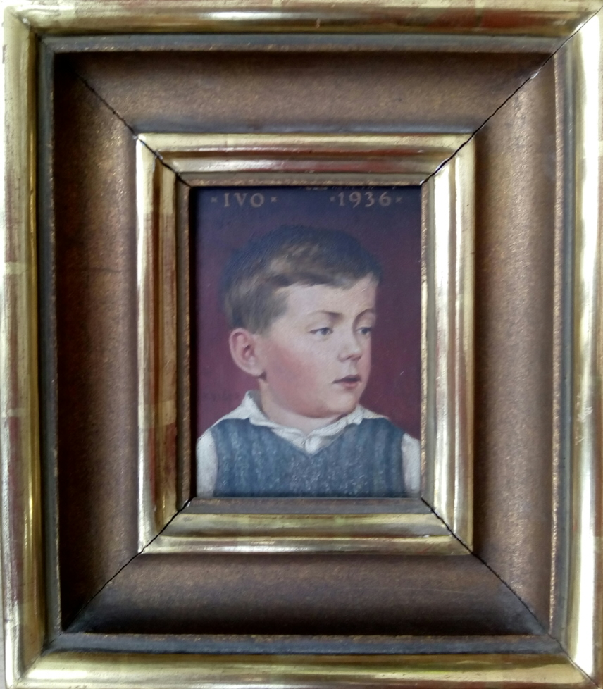 Syn Ivo